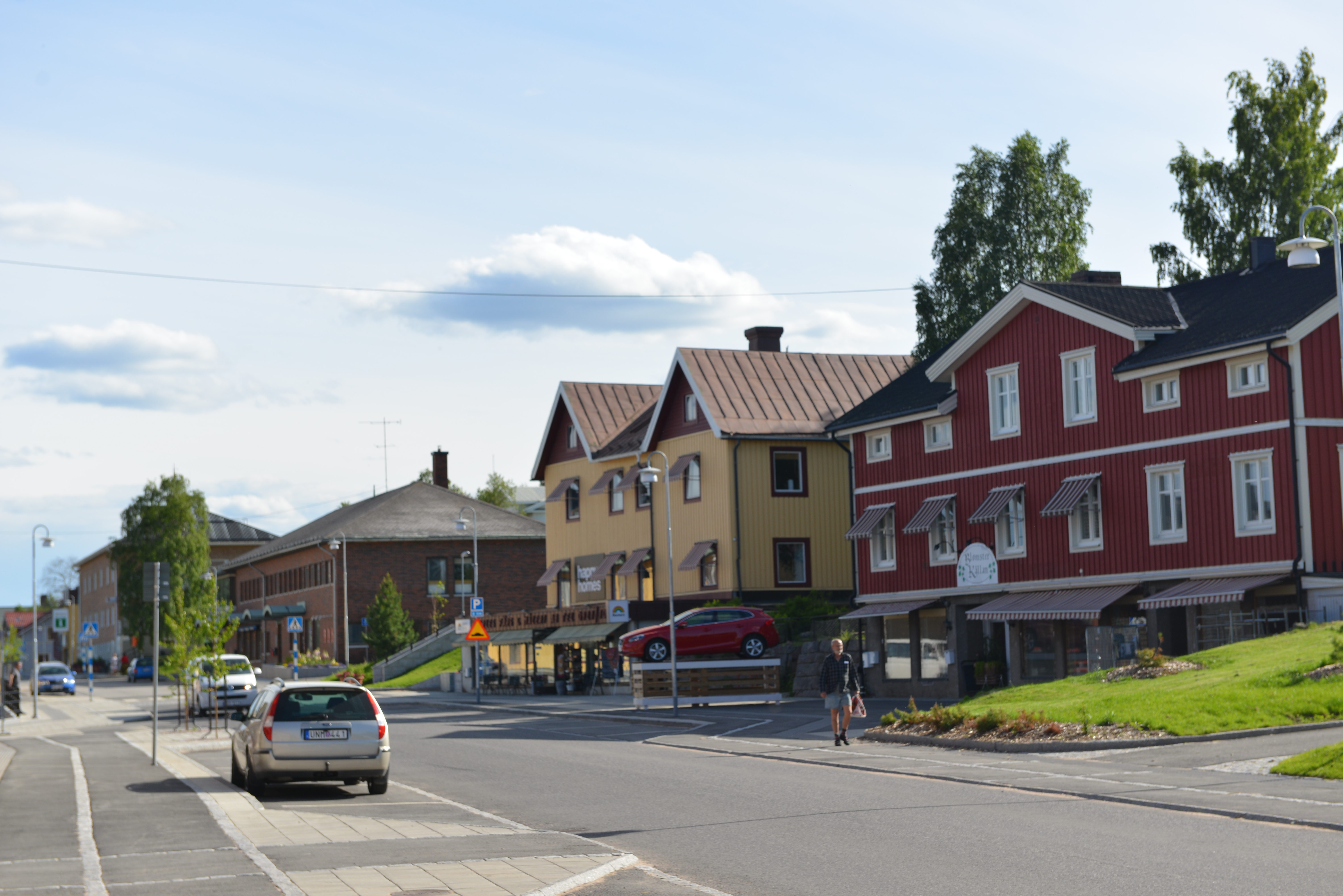 Övertorneå centrum